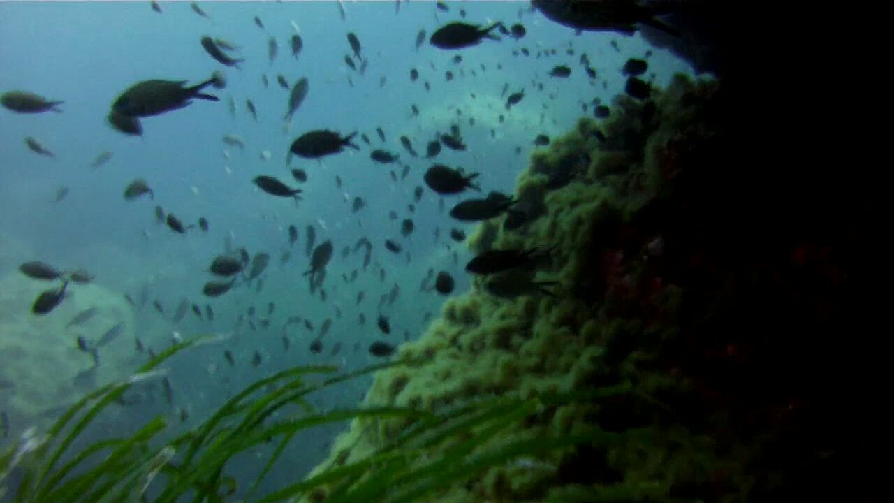 Cirkewwa Arch